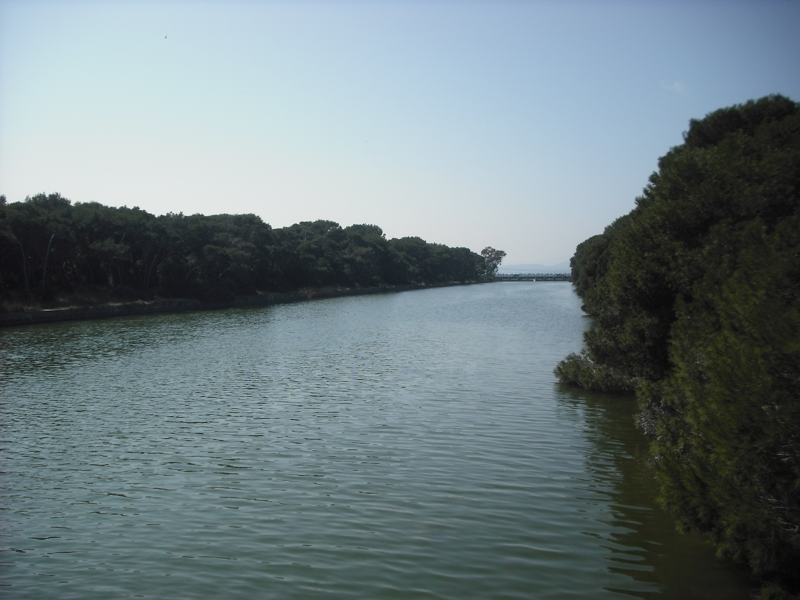 Vista de la Gola de Pujol, que uneix l'Albufera amb la mar Mediterrània.